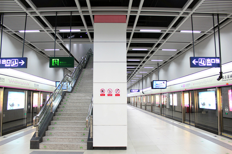 中文（中国大陆）: 武汉地铁2号线